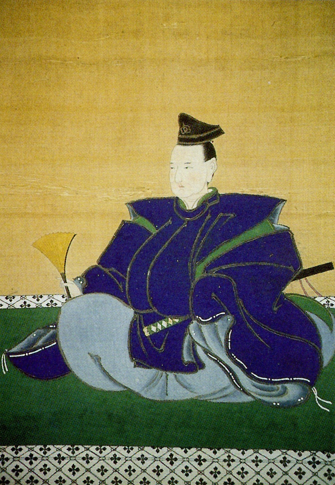 多久茂明の肖像。